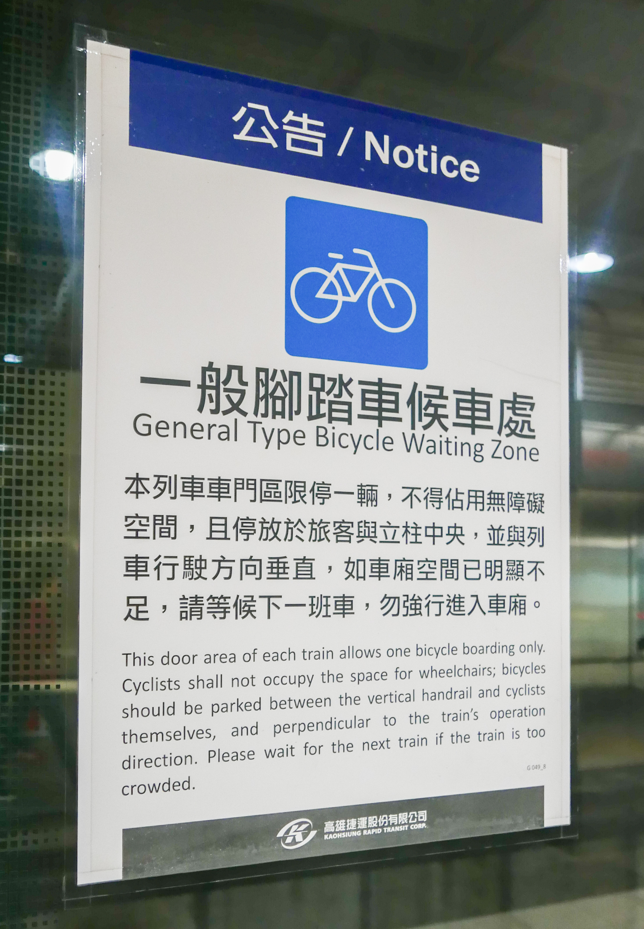 高雄捷運 自転車持込についての注意 （中央公園駅・ホーム）